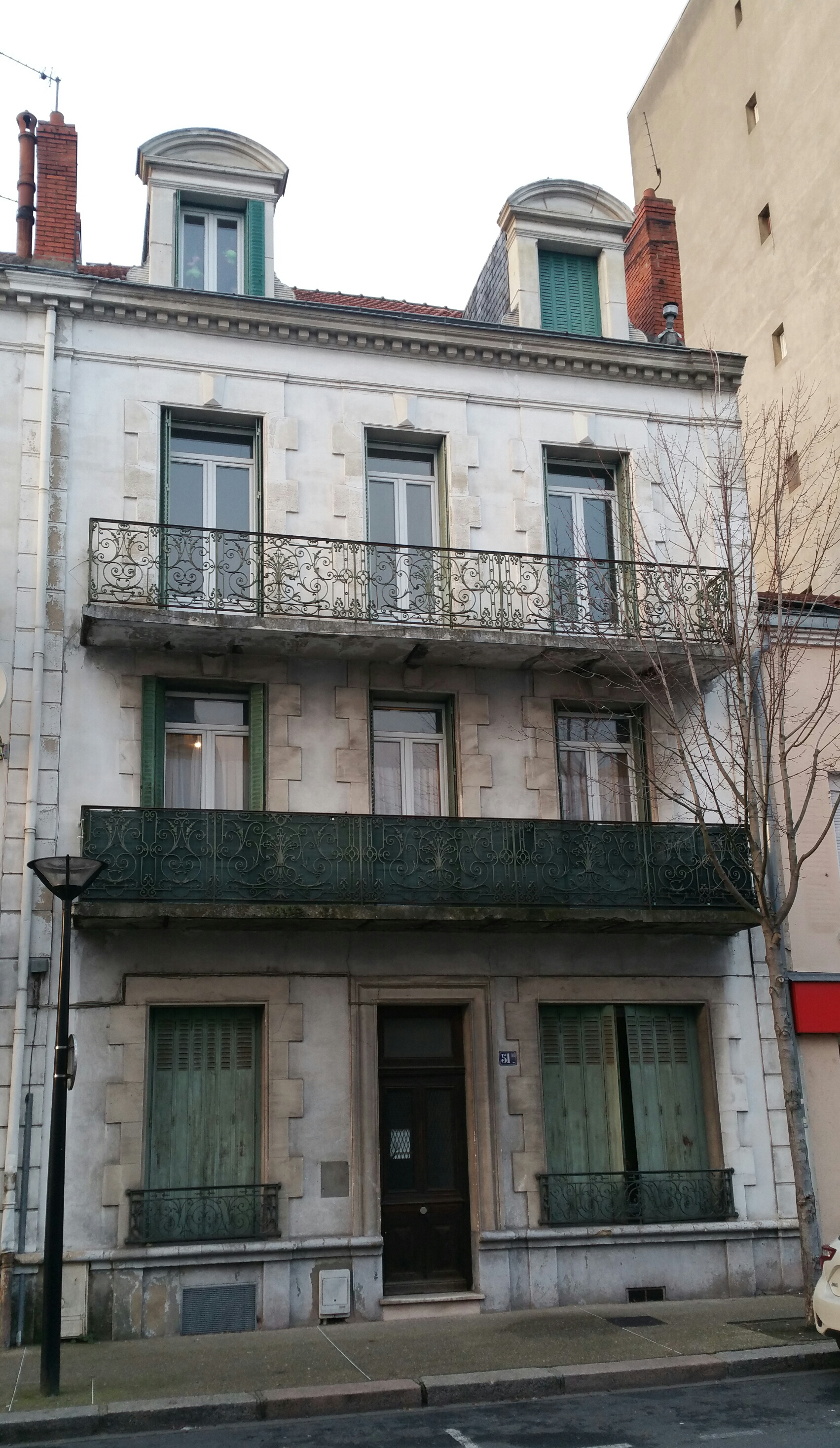 Immeuble de Vichy au 51bis avenue du Président-Doumer, maison natale en 1918 (alors nommée rue de la Gare) du résistant et poète Jacques Laurent.